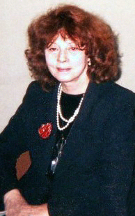 Régine Deforges, écrivaine et éditrice française.